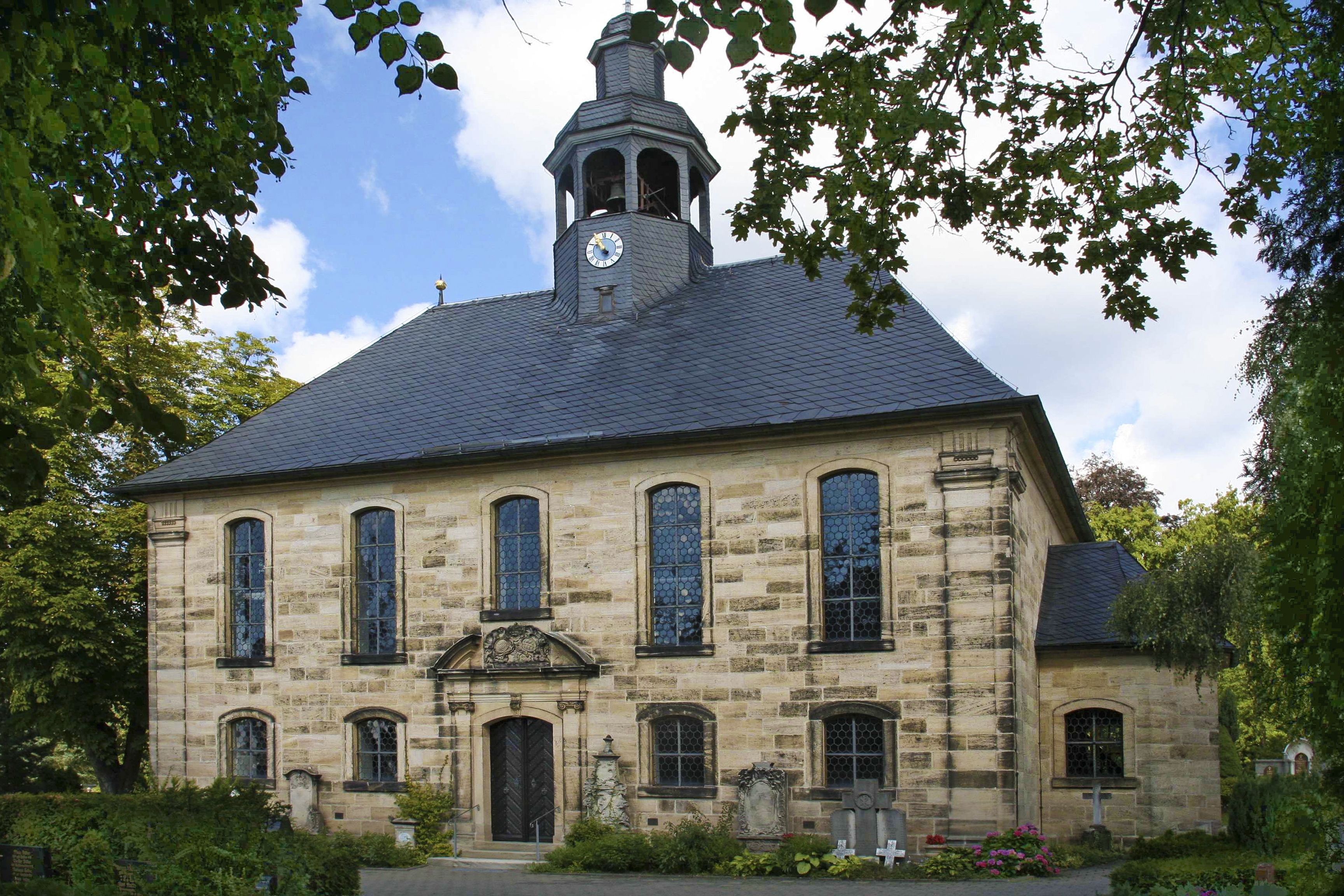 ev. Auferstehungskirche (Friedhofskirche) in Neustadt bei Coburg, Landkreis Coburg